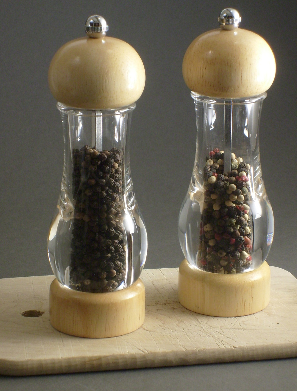 Zwei Plexiglas-Pfeffermühlen